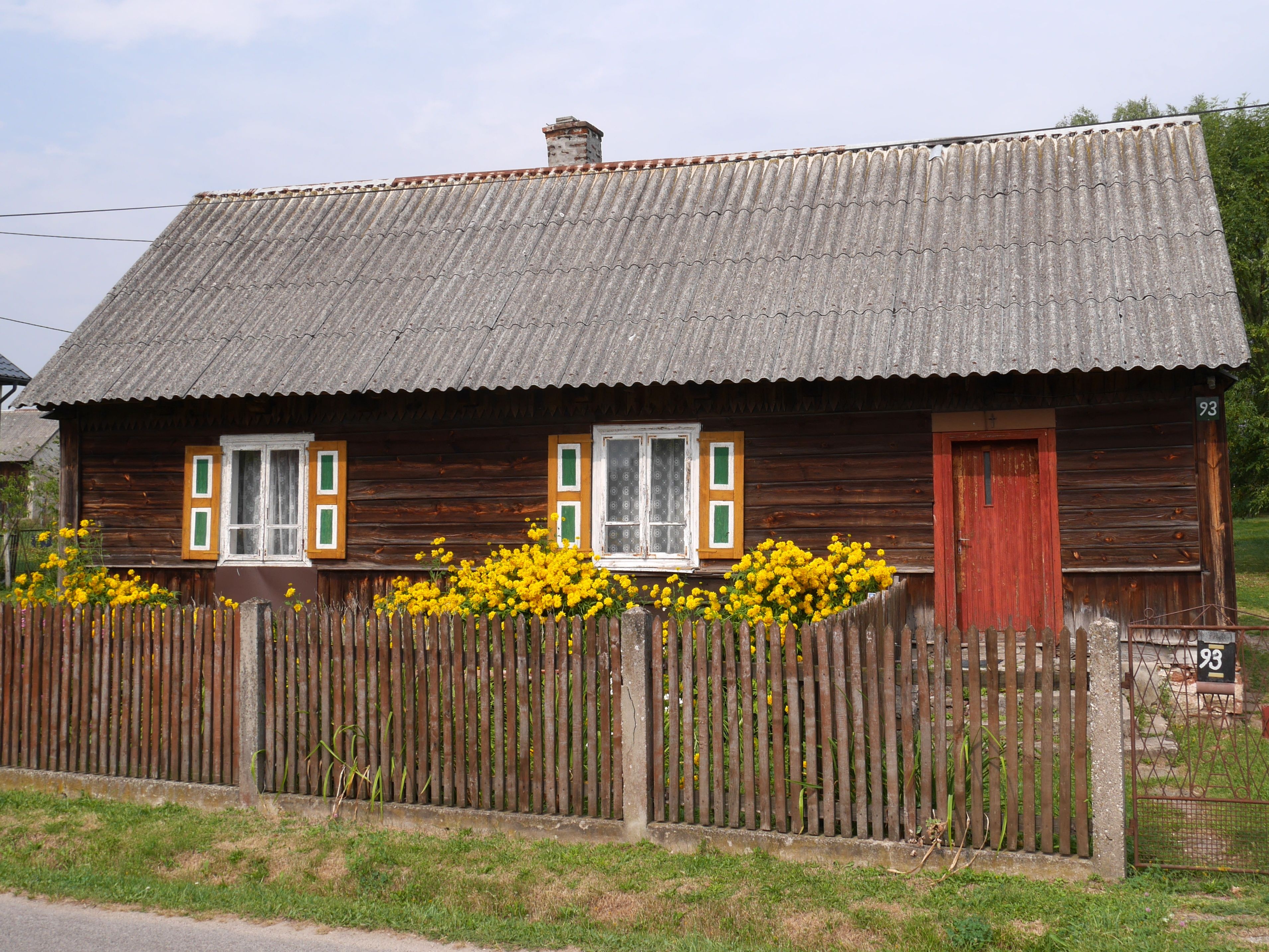 Building in Łabędziów